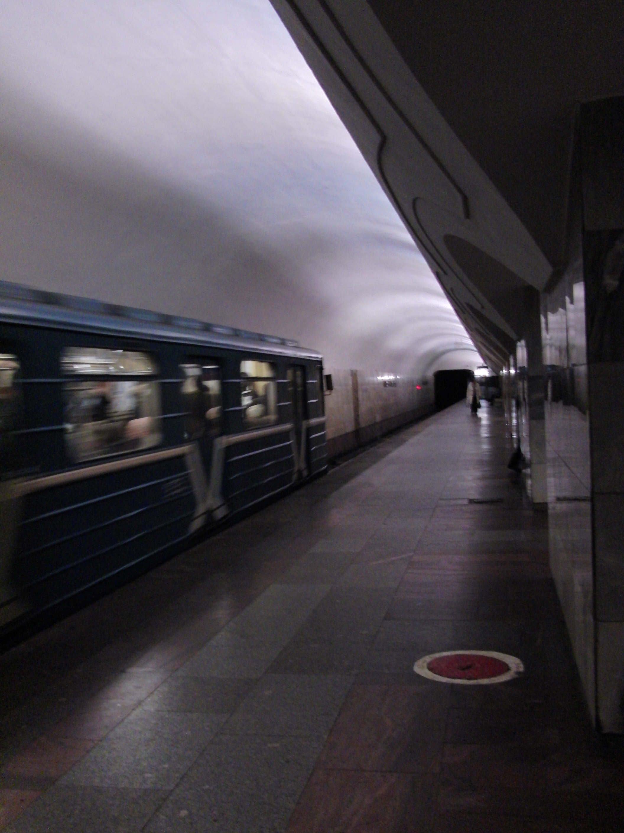 Shosse Entuziastov (Шоссе Энтузиастов)